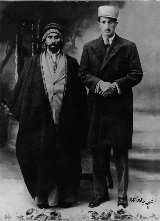 آخر ولاة لرستان (يد الله خان بن غلام رضا خان)و هو يقف إلى جانب احد شيوخ القبائل العربية